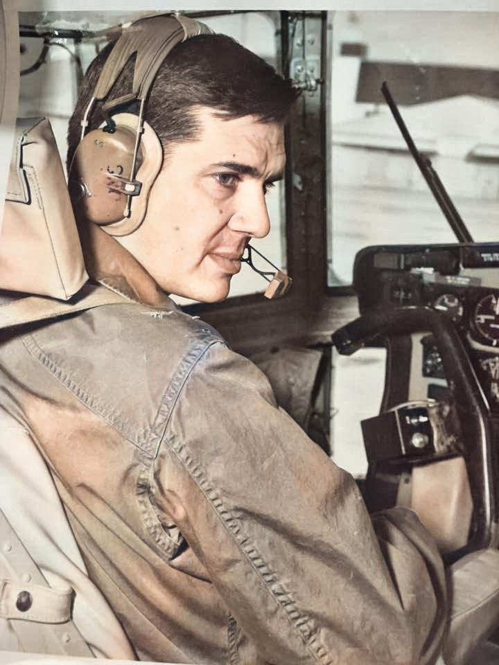 Basilio Lami Dozo piloteando un Hércules.